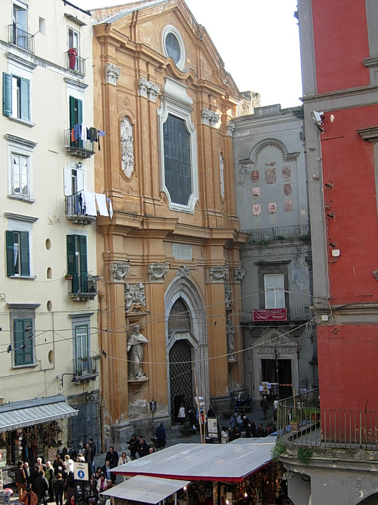 Facciata della Chiesa di San Lorenzo Maggiore in Napoli Foto personale